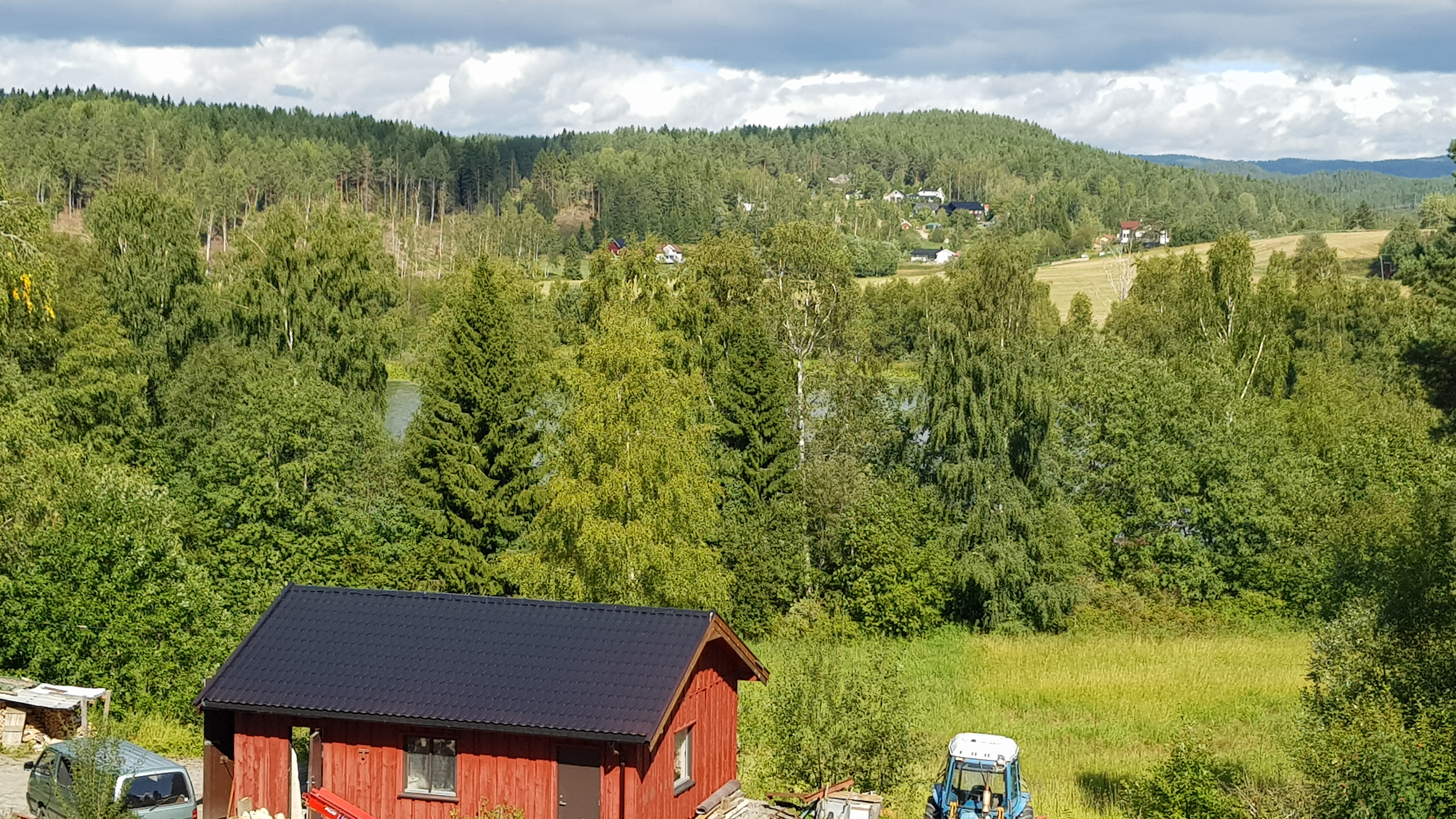 Solbergtjern ligger langs Pjåkavien på Tyristrand